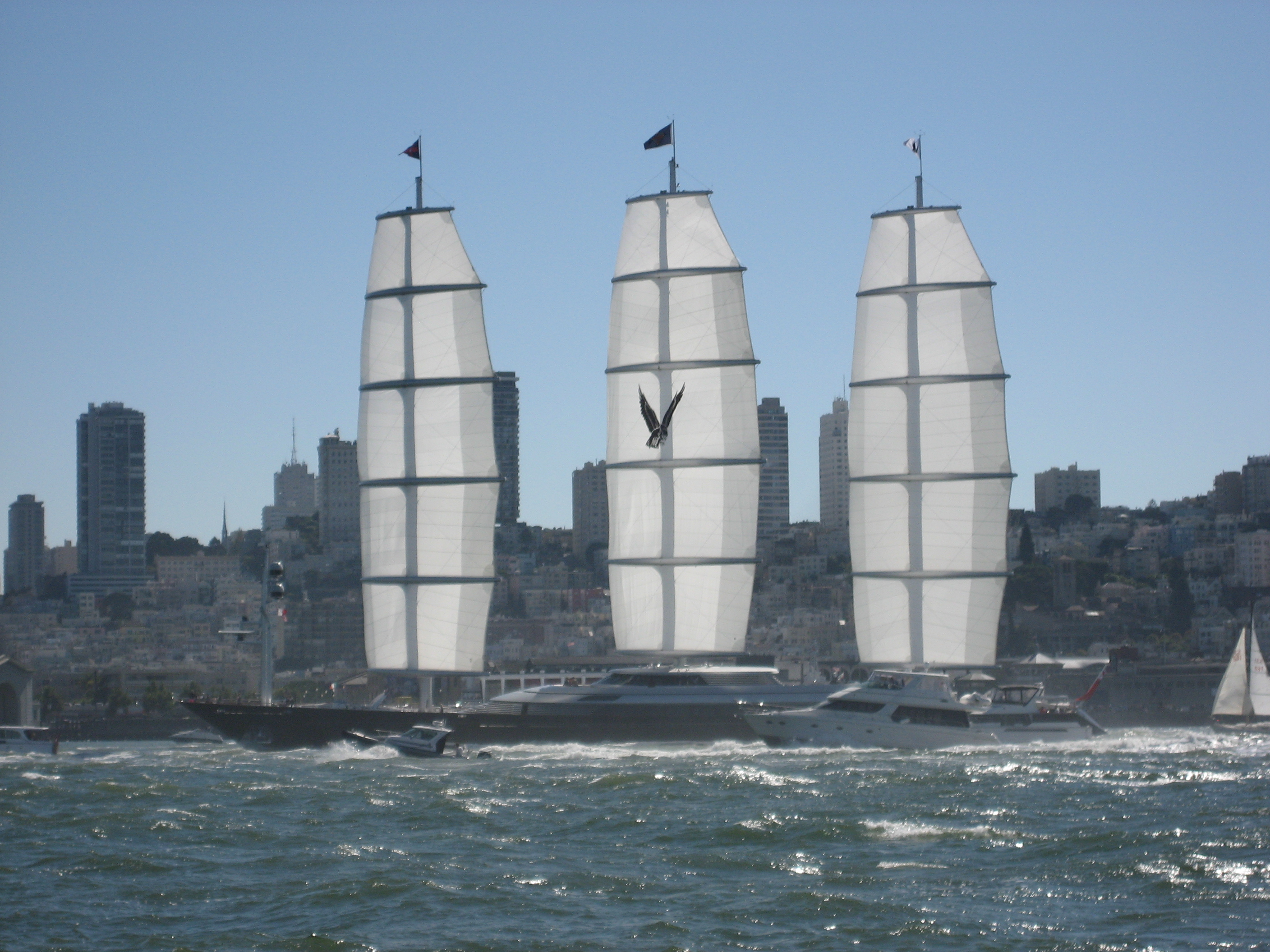 maltese_falcon_sf_1